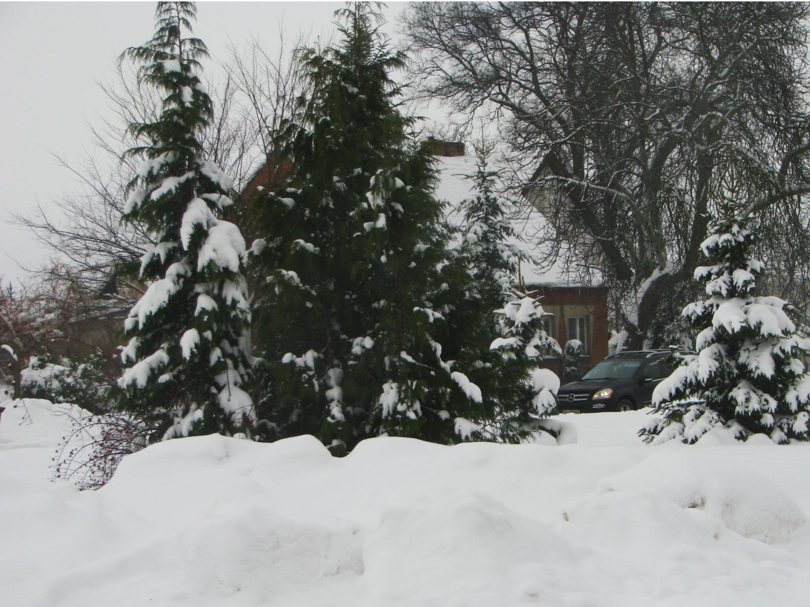 Wojcieszyce. Zima